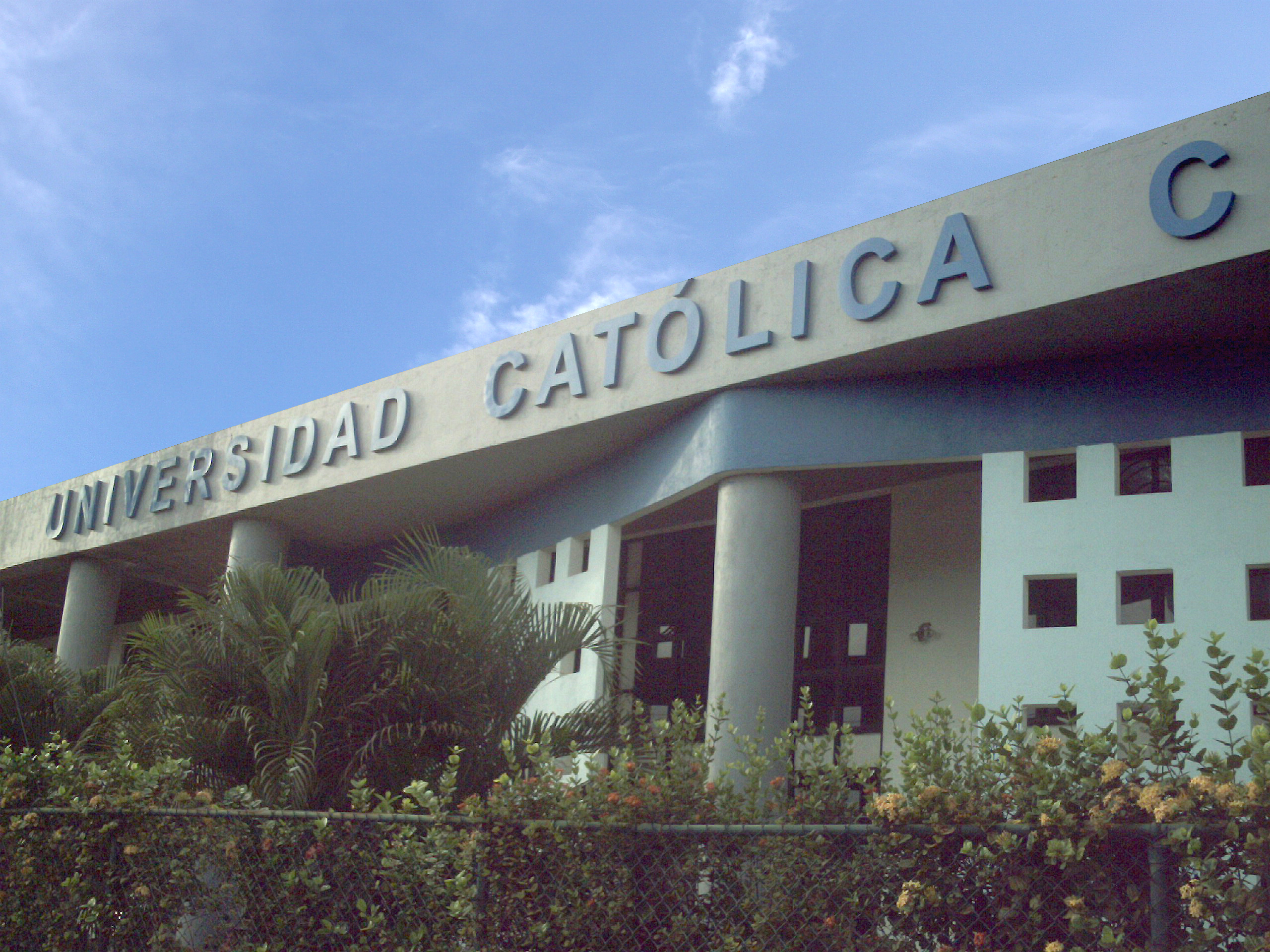 Universidad que contempla carreras humanisticas